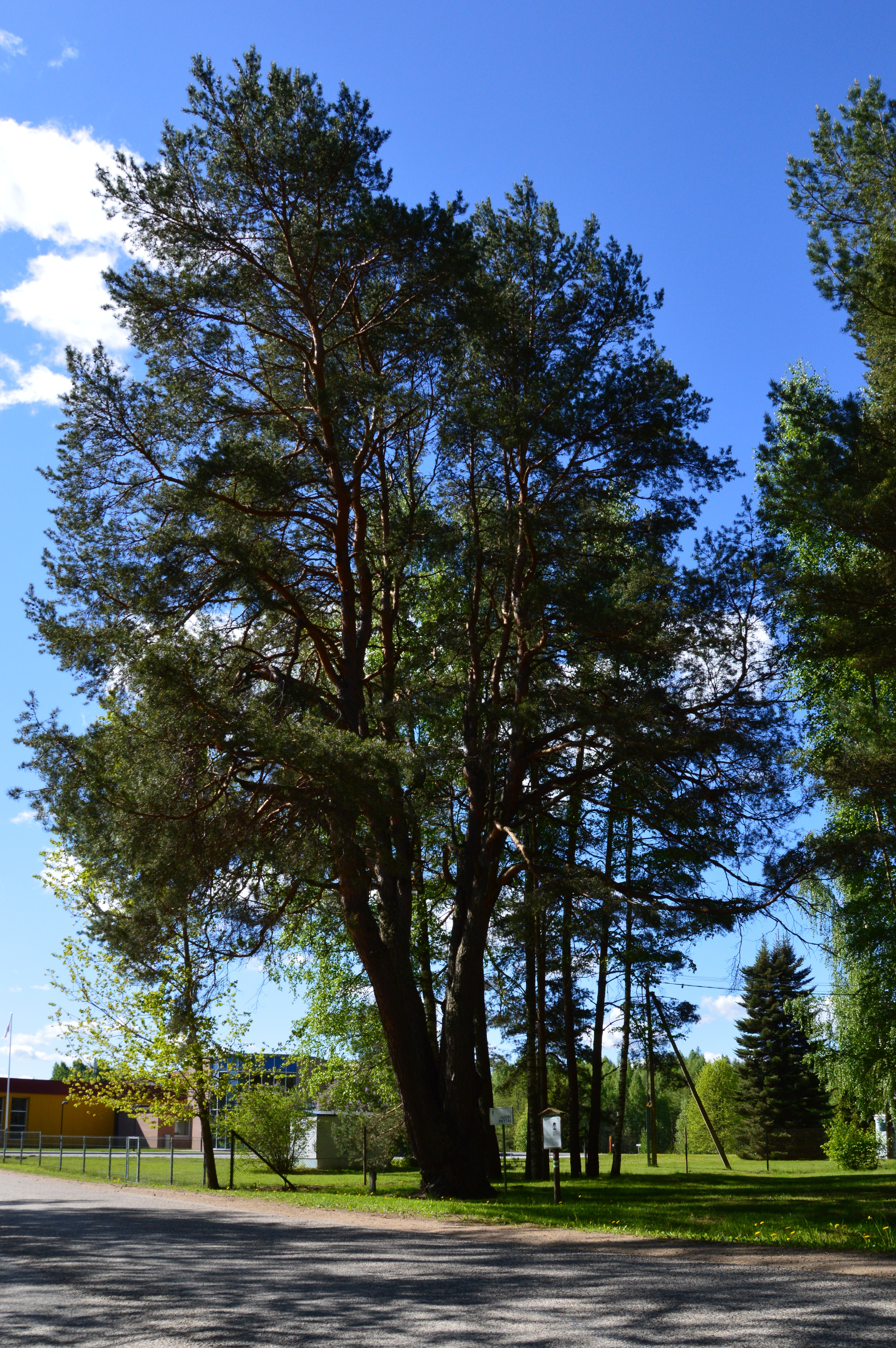 Laudsi pettäi Värska aleviku lõunapiiril.